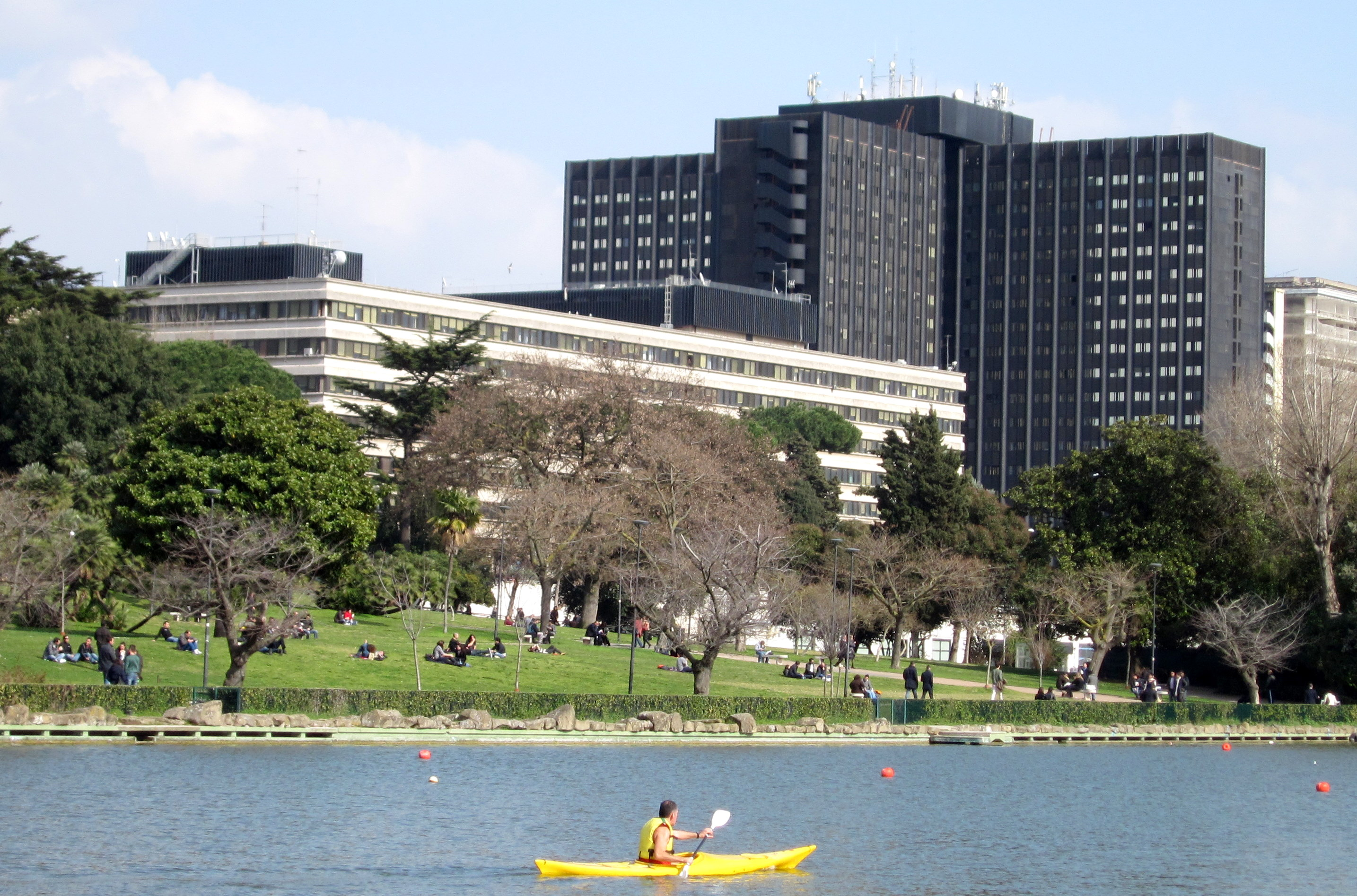 Il complesso delle Poste Italiane di Viale Europa a Roma visto dal laghetto dell'EUR.